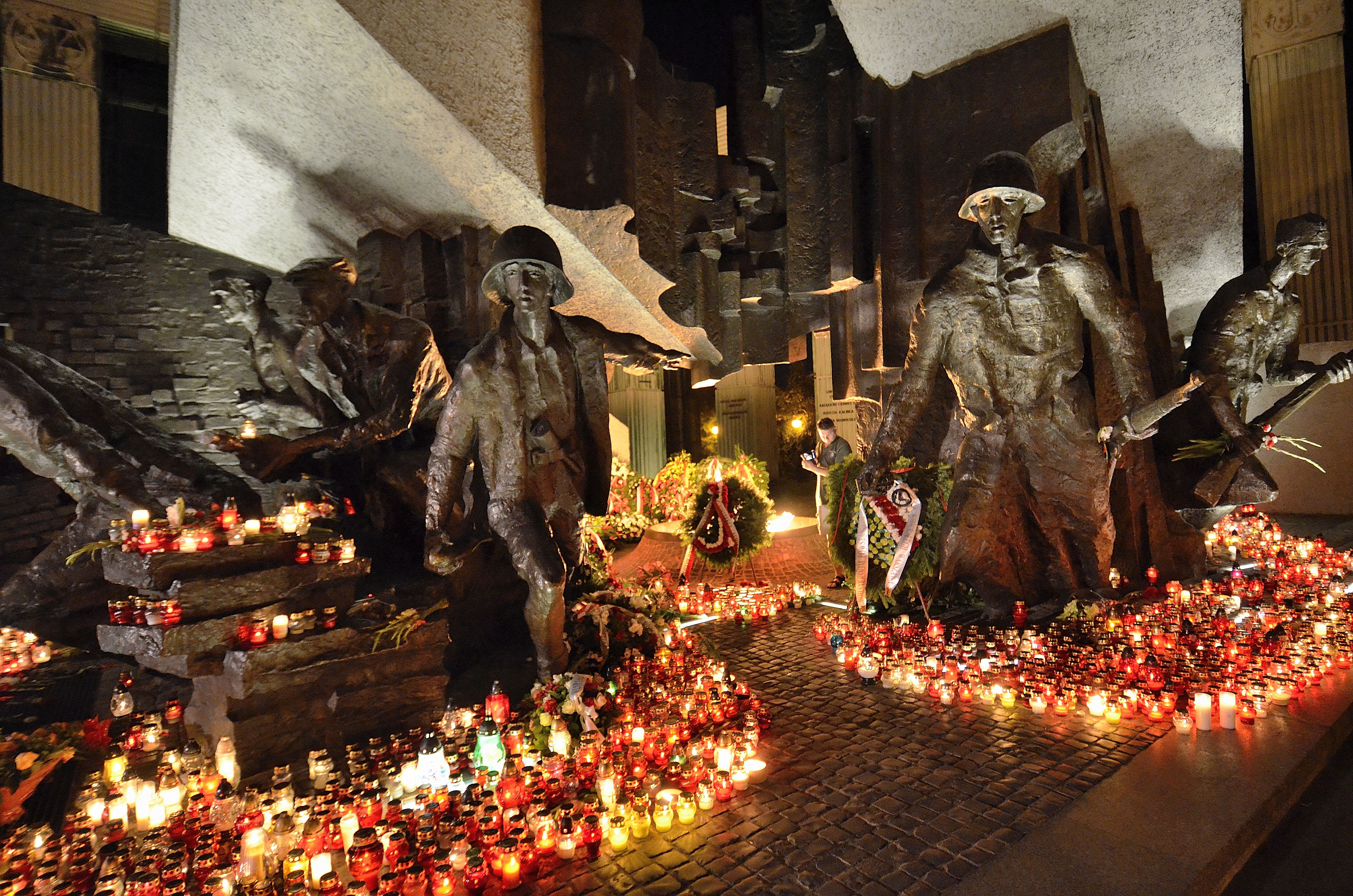 Pomnik Powstania Warszawskiego 1 sierpnia 2015